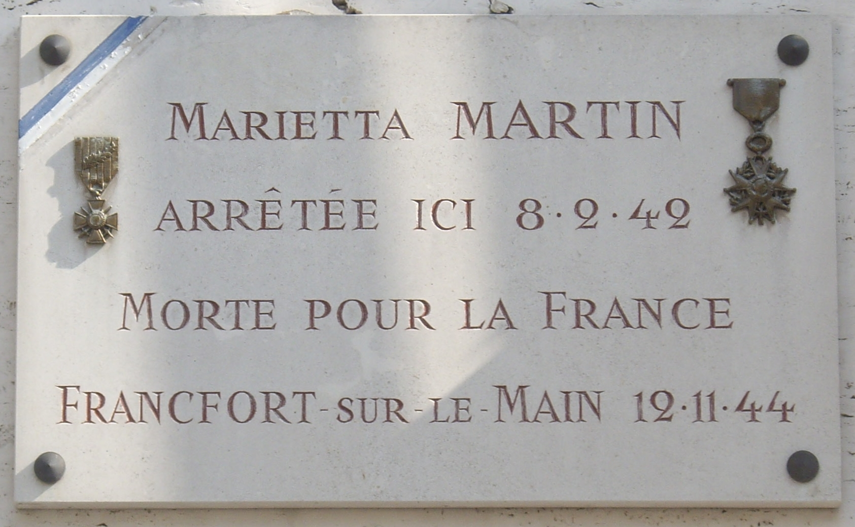 Plaque commémorative, 34 rue de l'Assomption, Paris 16e. « Marietta Martin, arrêtée ici, 8.2.42. Morte pour la France, Francfort-sur-le-Main, 12.11.44. »